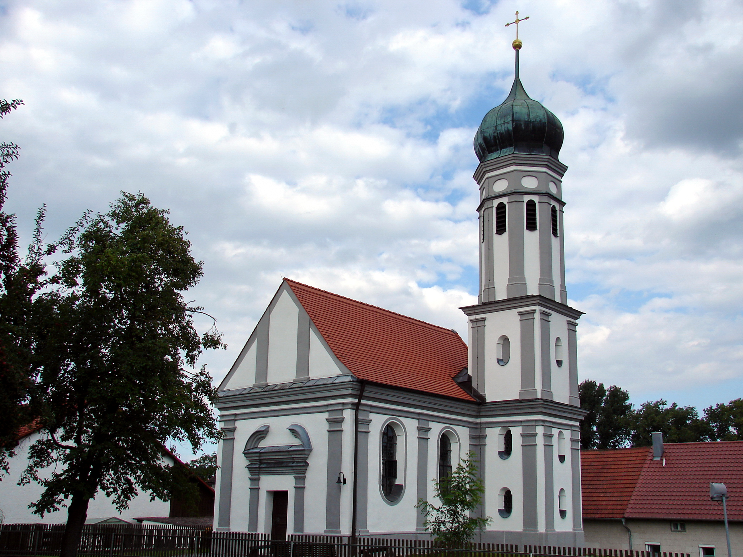 Kath. Filialkirche St. Laurentius; einheitlicher Bau von 1716; mit Ausstattung.